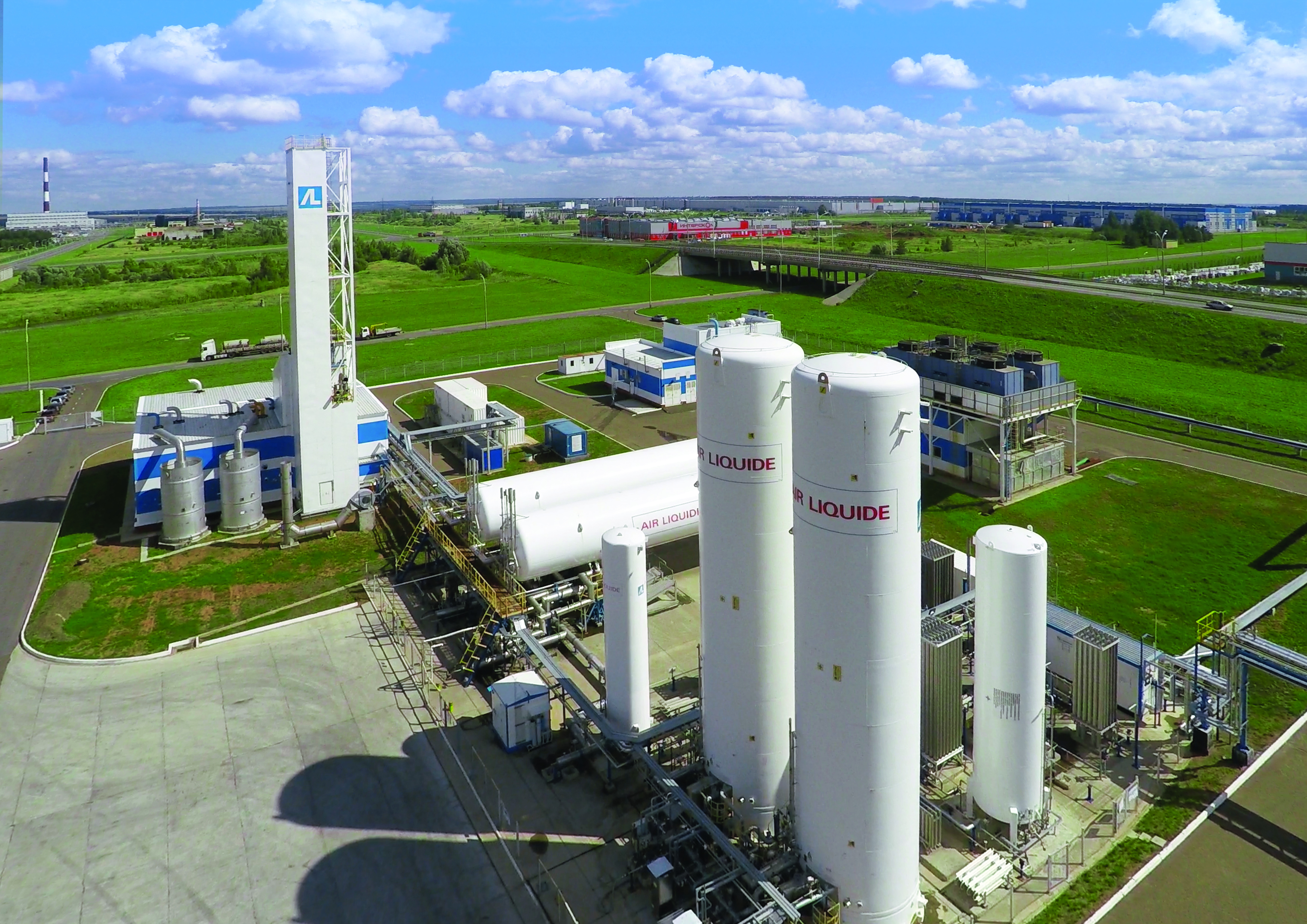 Особая экономическая зона «Алабуга», Завод «Эр Ликид Алабуга»